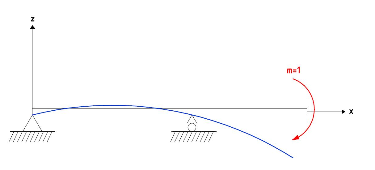 segédlet a Betti-tétel szócikkhez